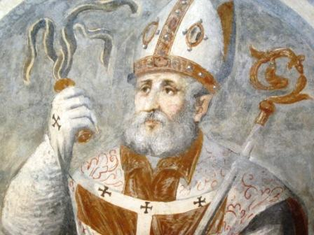 Chiesa vecchia di Sacconago - Sant'Ambrogio